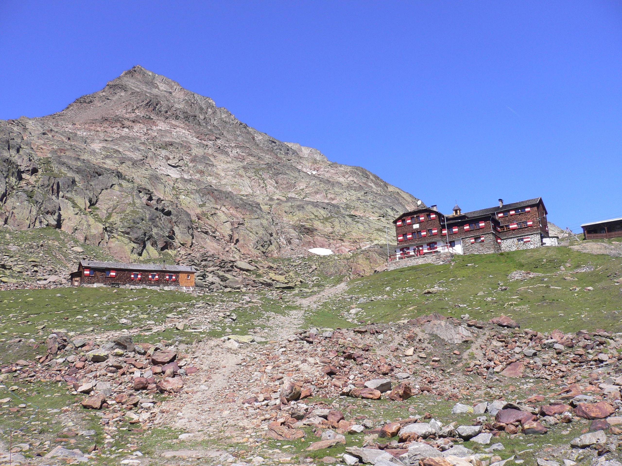 Vernagt Hütte (Würzburger Haus); DAV, in den Ötztaler Alpen, links das Hintergrasleck